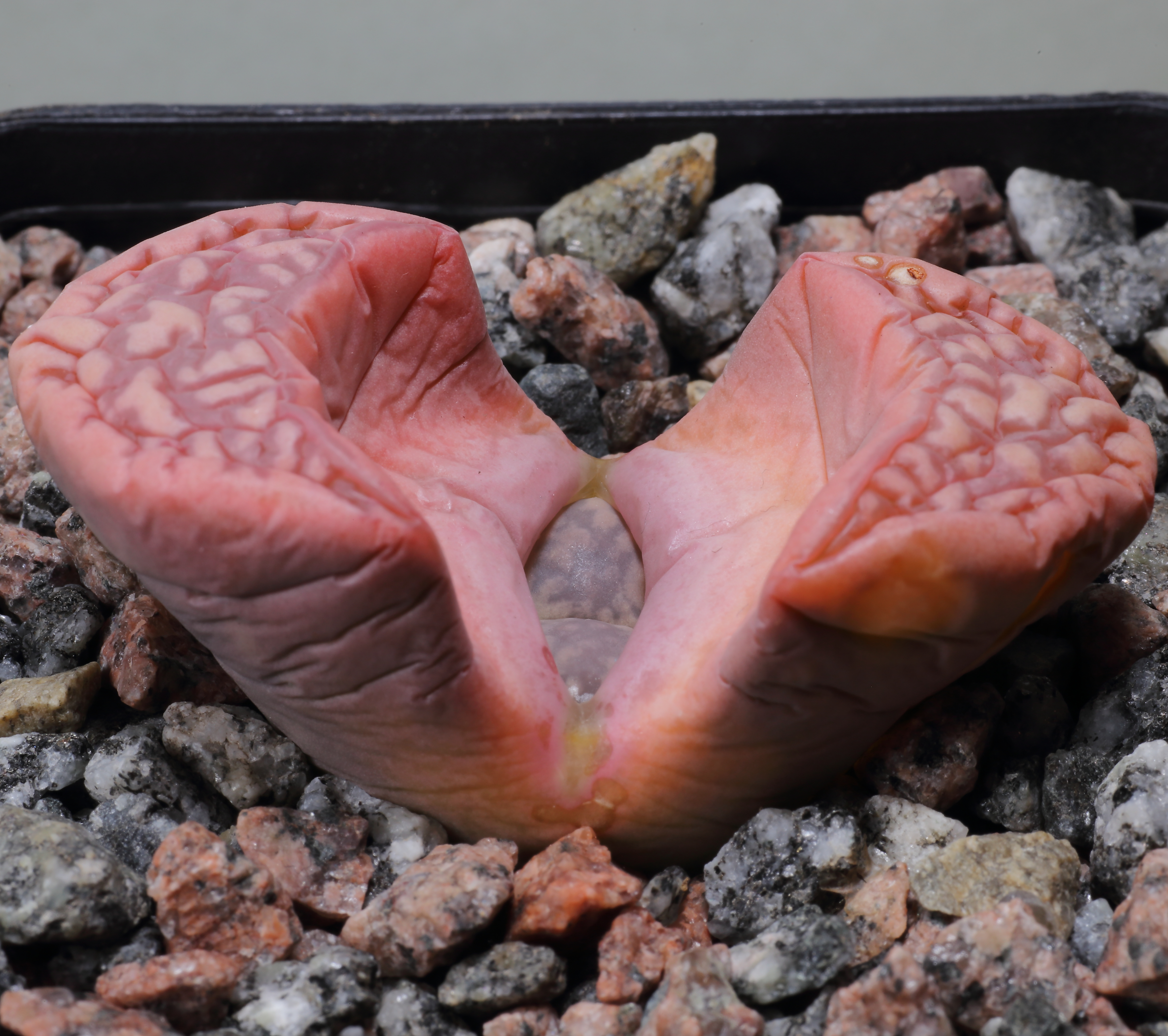 Lithops marmorata v. elisae C 252